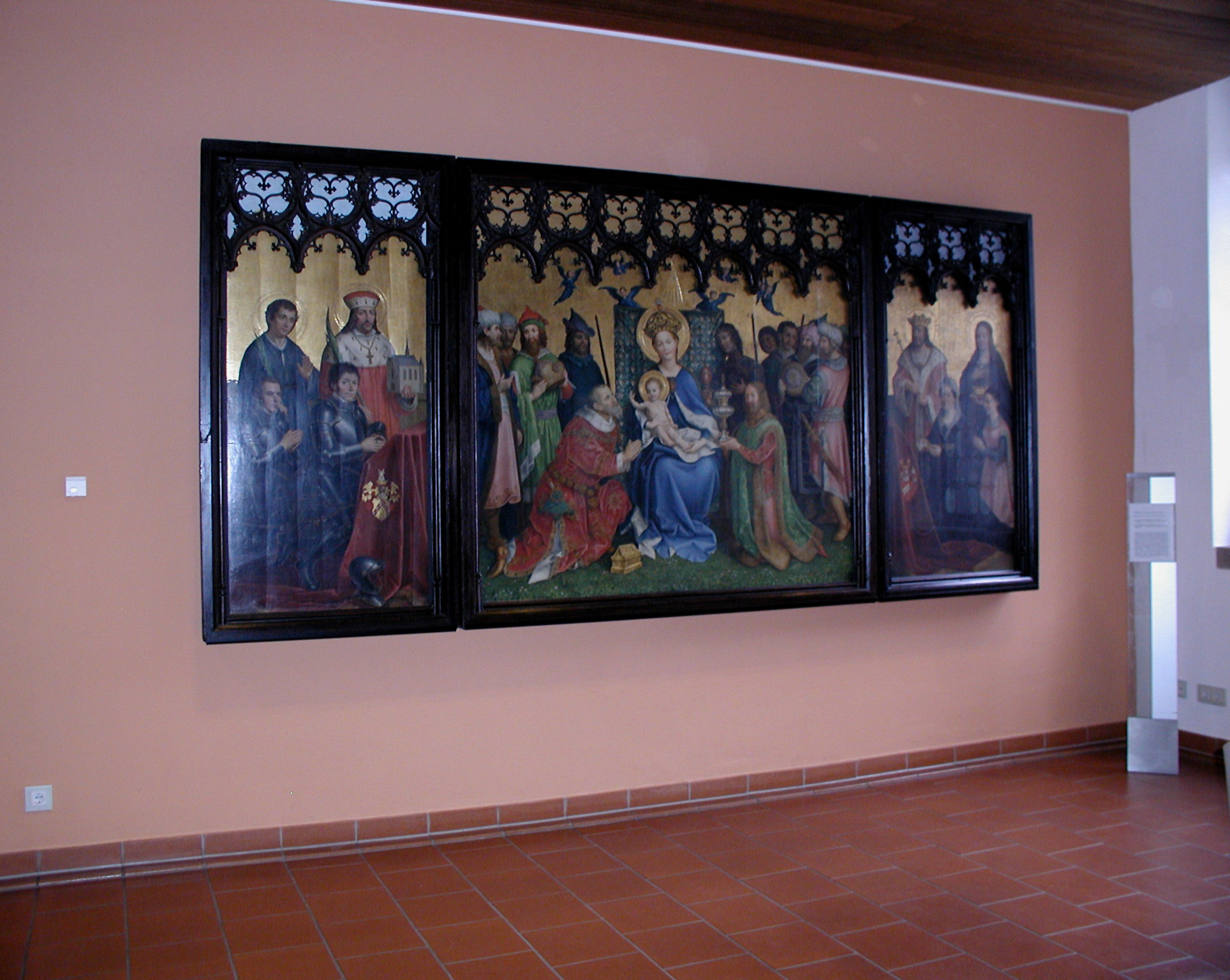 Köln-Rathaus, Foyer Kopie Stephan Lochners „Stadtpatrone“